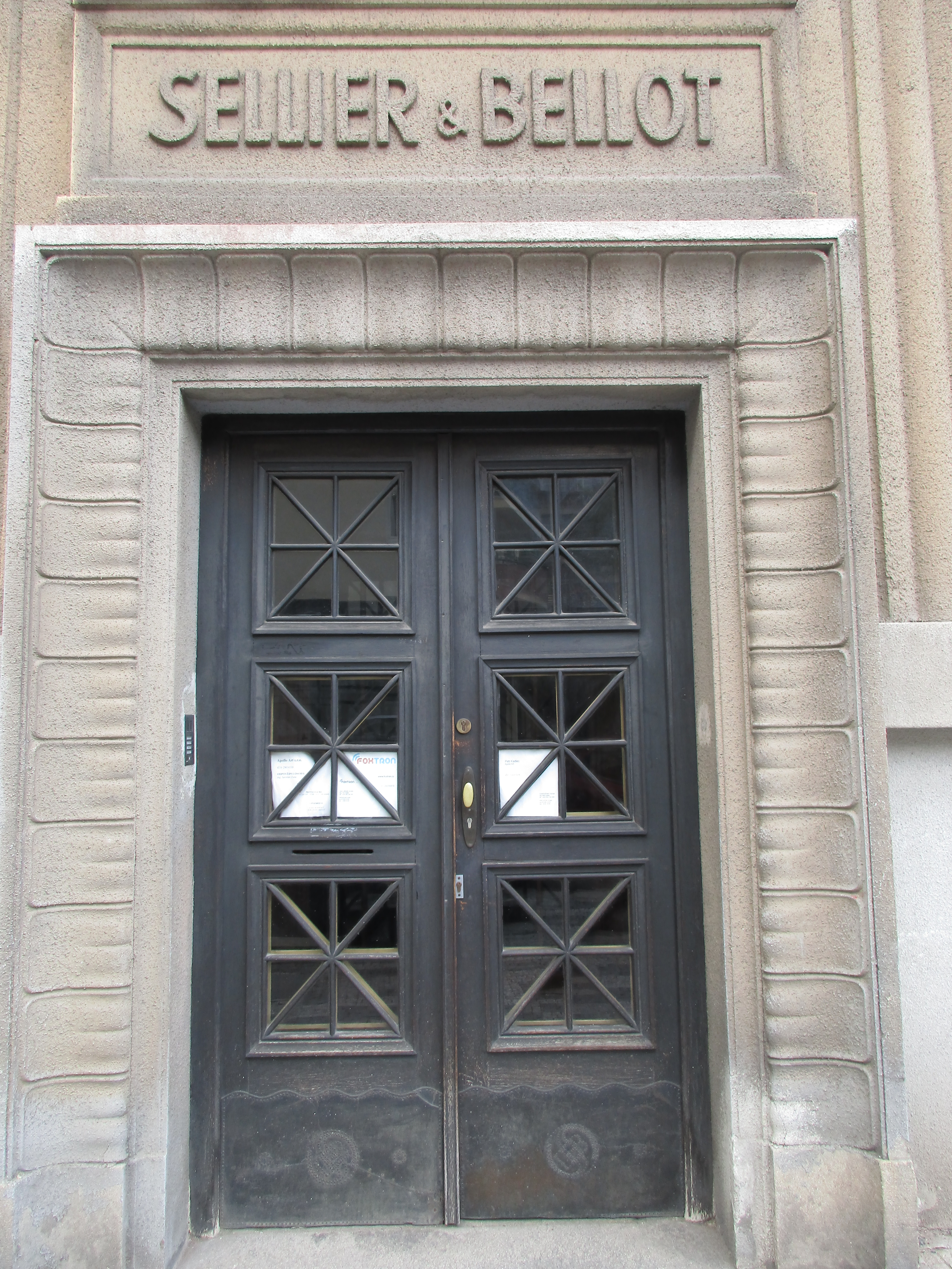 Koldínova 1/Jeseniova 53 - Sellier & Bellot. Administrativní objekt vystavěla roku 1925 firma V. Nekvasil, architektem byl pravděpodobně Bohumír Kozák. Detail.